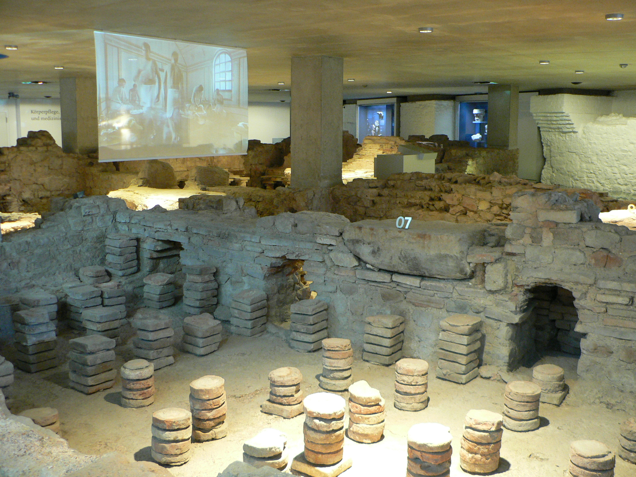 Blick vom zweiten Tepidarium über die Thermenanlage